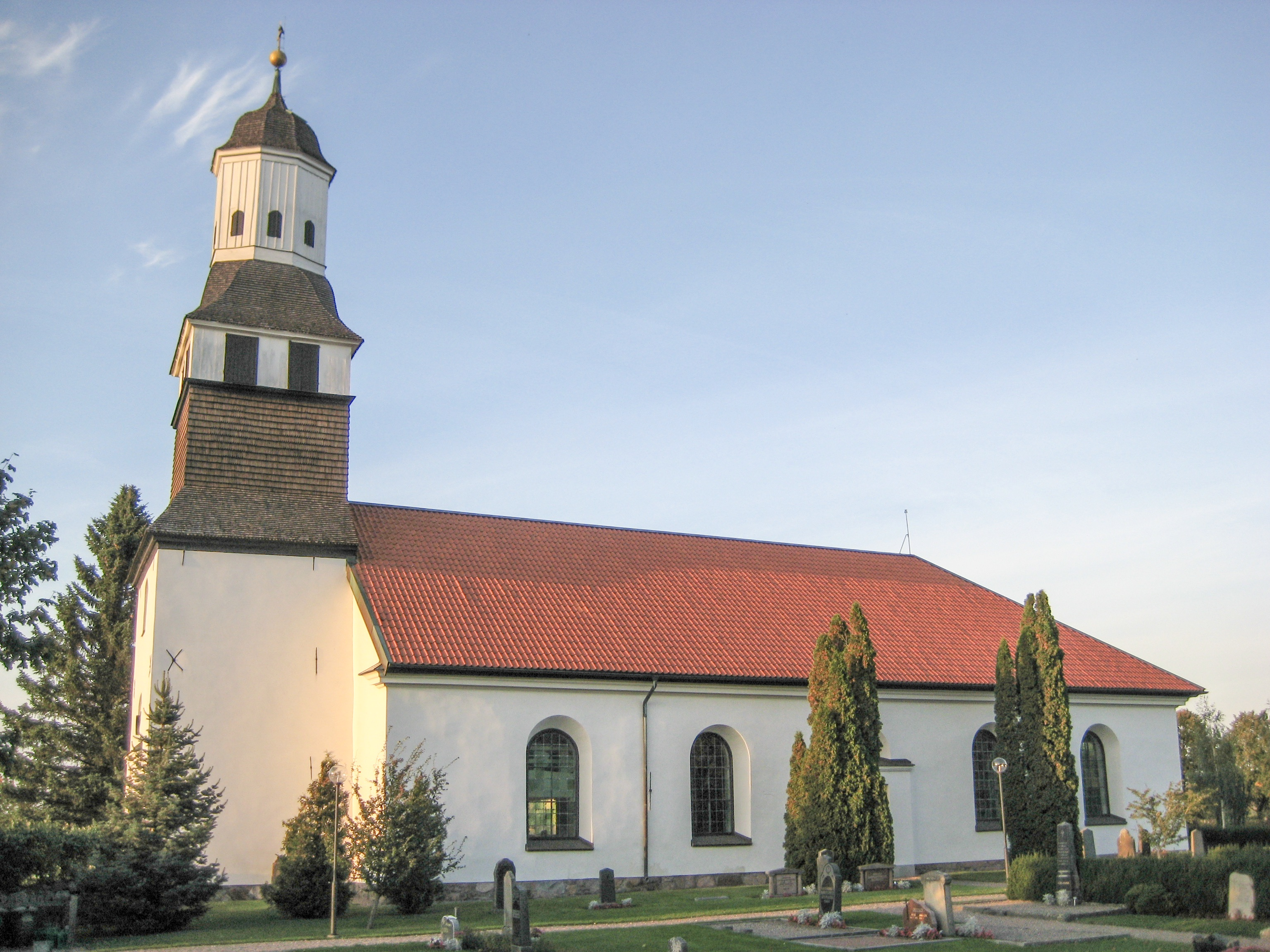 Skeda church in Östergötland, Sweden.